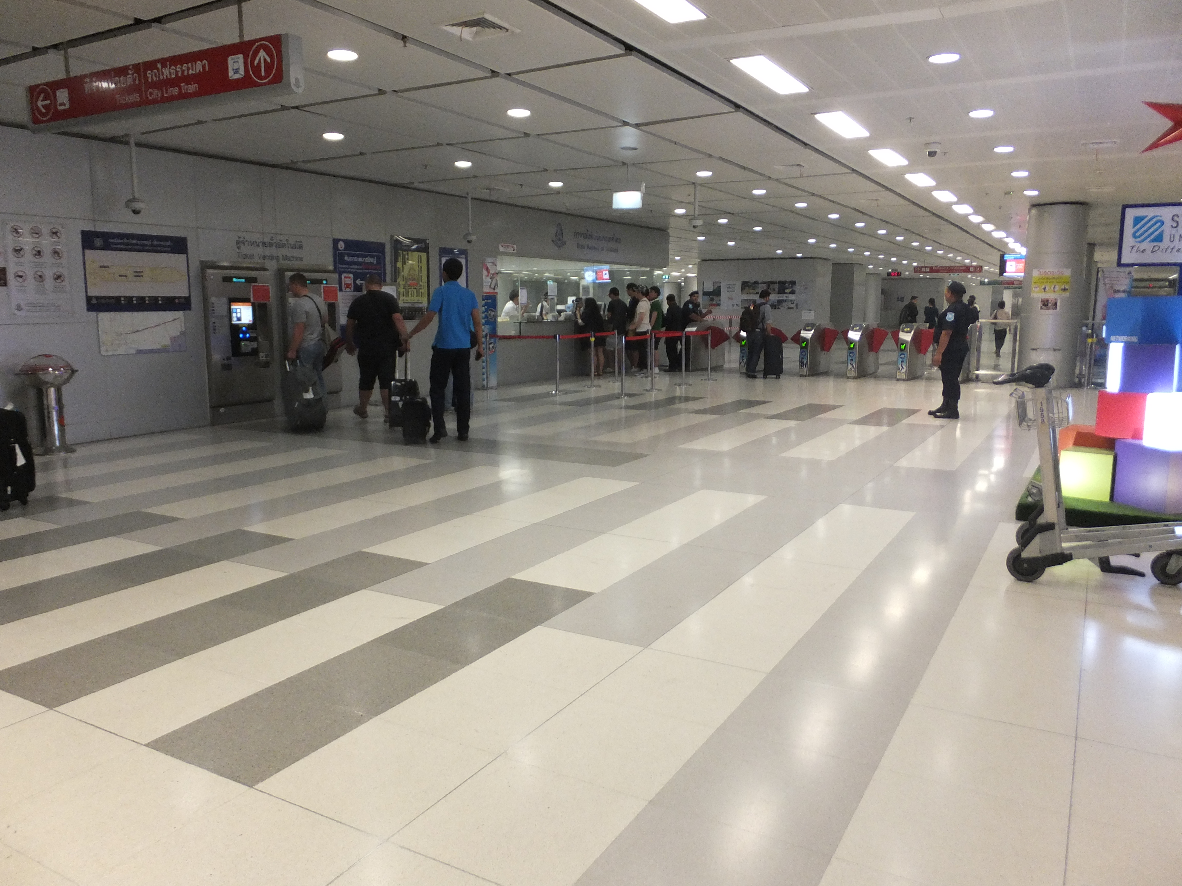 スワンナプーム駅改札口